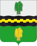 Герб Чернского района Тульской области